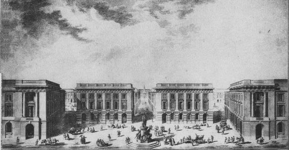 vue de la mairie de Reims (au bout de la rue au centre du dessin), la Perspective_est depuis_l'hôtel_des_fermes, actuelle sous-préfecture, au premier plan l'ancienne statue de Louis XV.